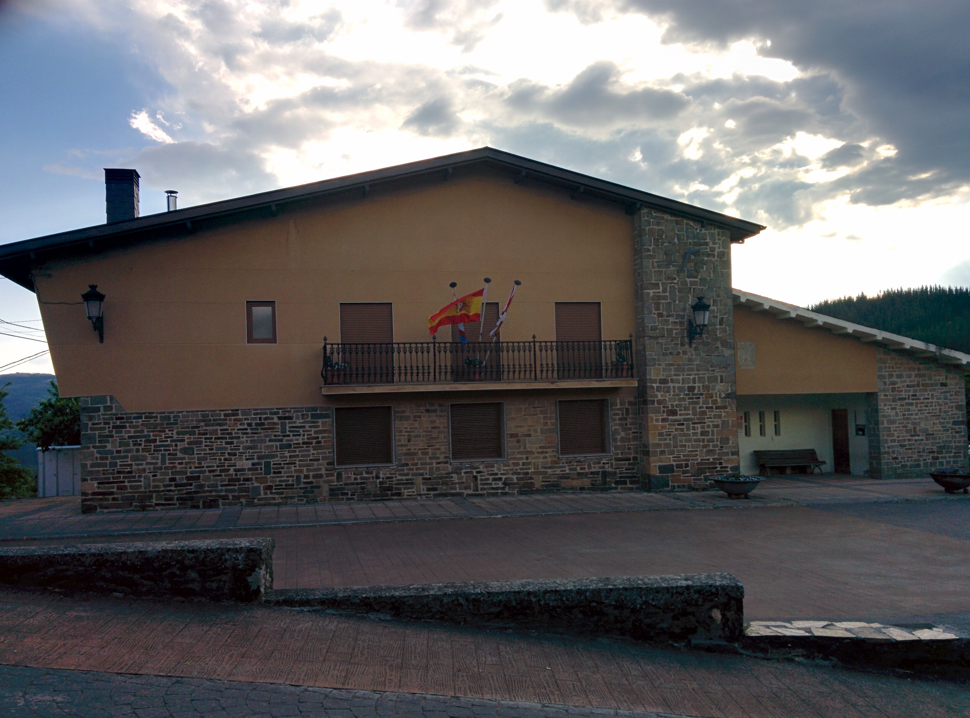 Casa consistorial de Berlanga del Bierzo (León, España).